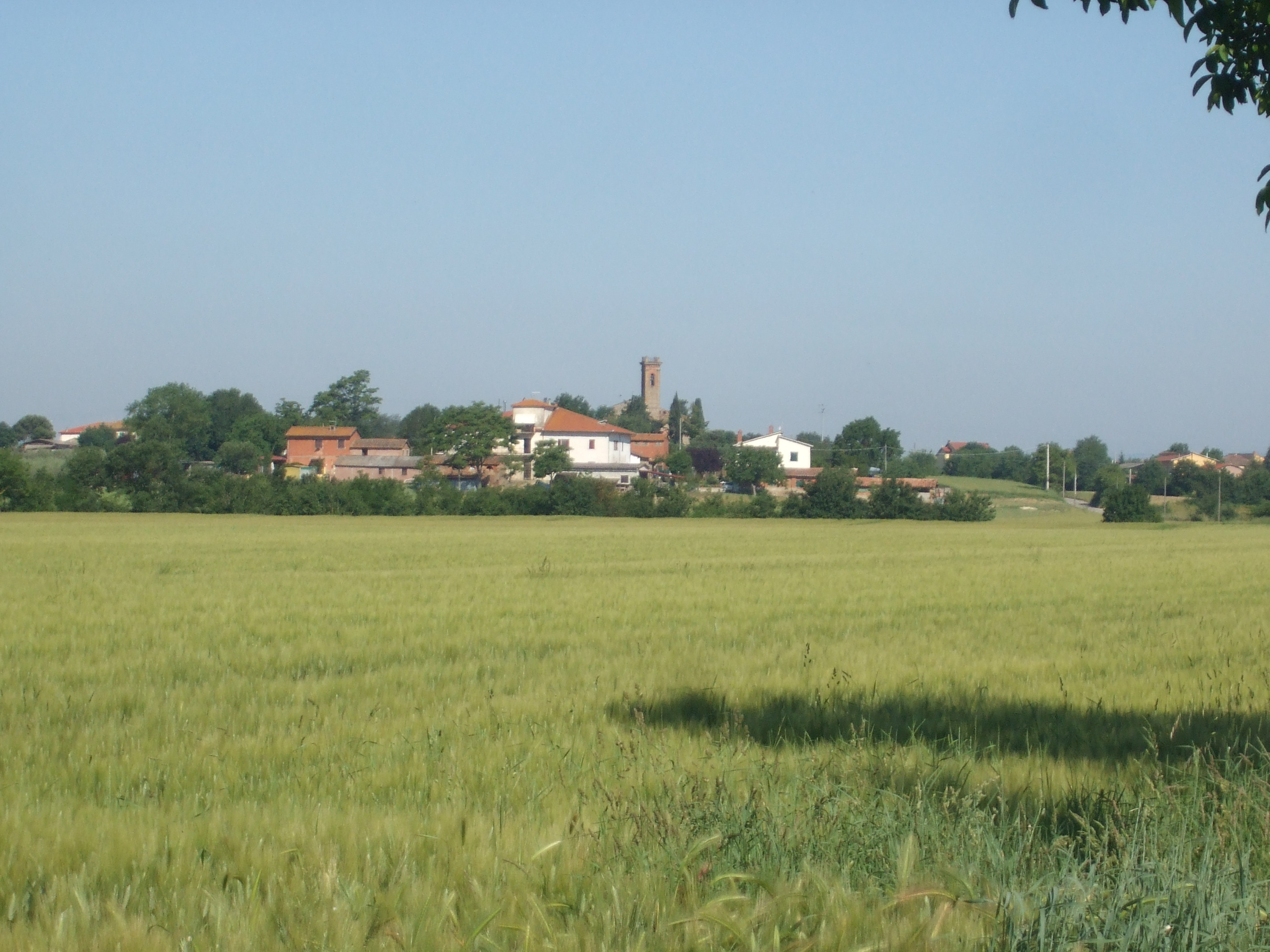 Castroncello